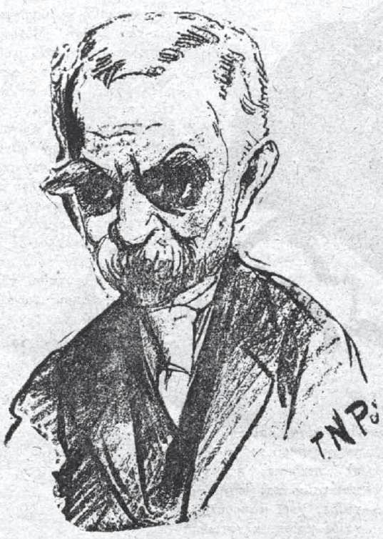 Künstlerkarikatur, Teil eines Kohlenstiftzyklus für die griechische Literaturzeitung Estia